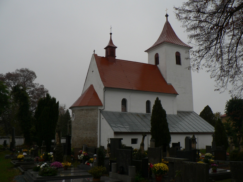 Kostel sv. Jakuba ve Vysokém Újezdu